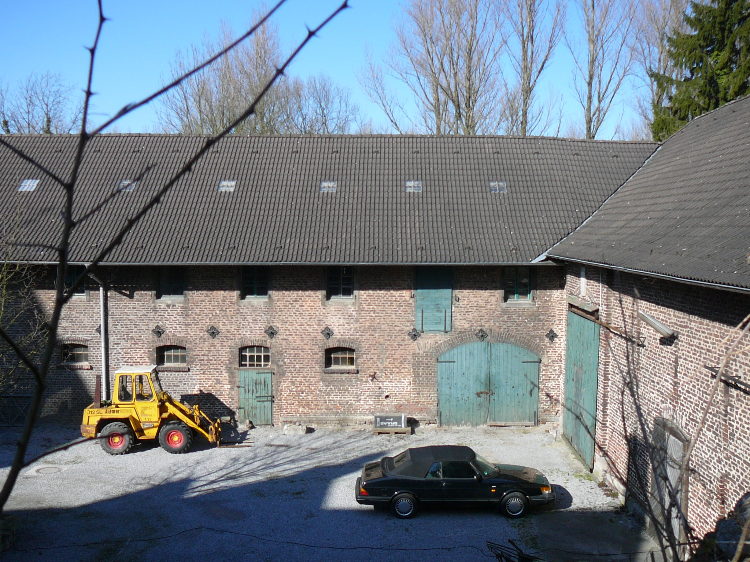 Wuppertal, Zur Düssel 2 (Gut Schöller)This is a photograph of an architectural monument. 3958